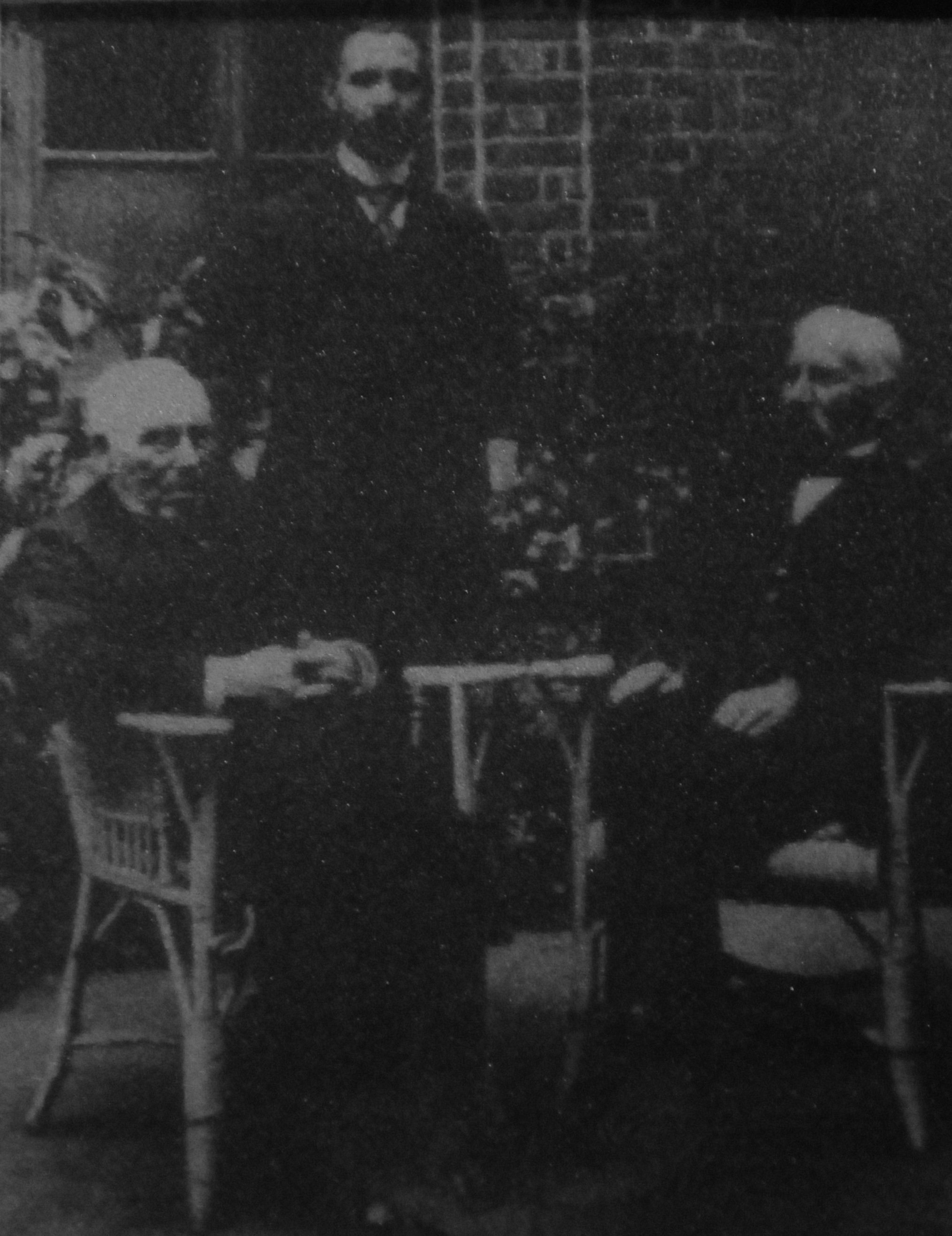 D' Uergel an der Parkierch zu Diddeleng gouf 1912 vun der Uergelmanufaktur Georg Stahlhuth gebaut. Vu lénks no riets: De Georg, de Ludwig Georg an den Eduard Stahlhuth.